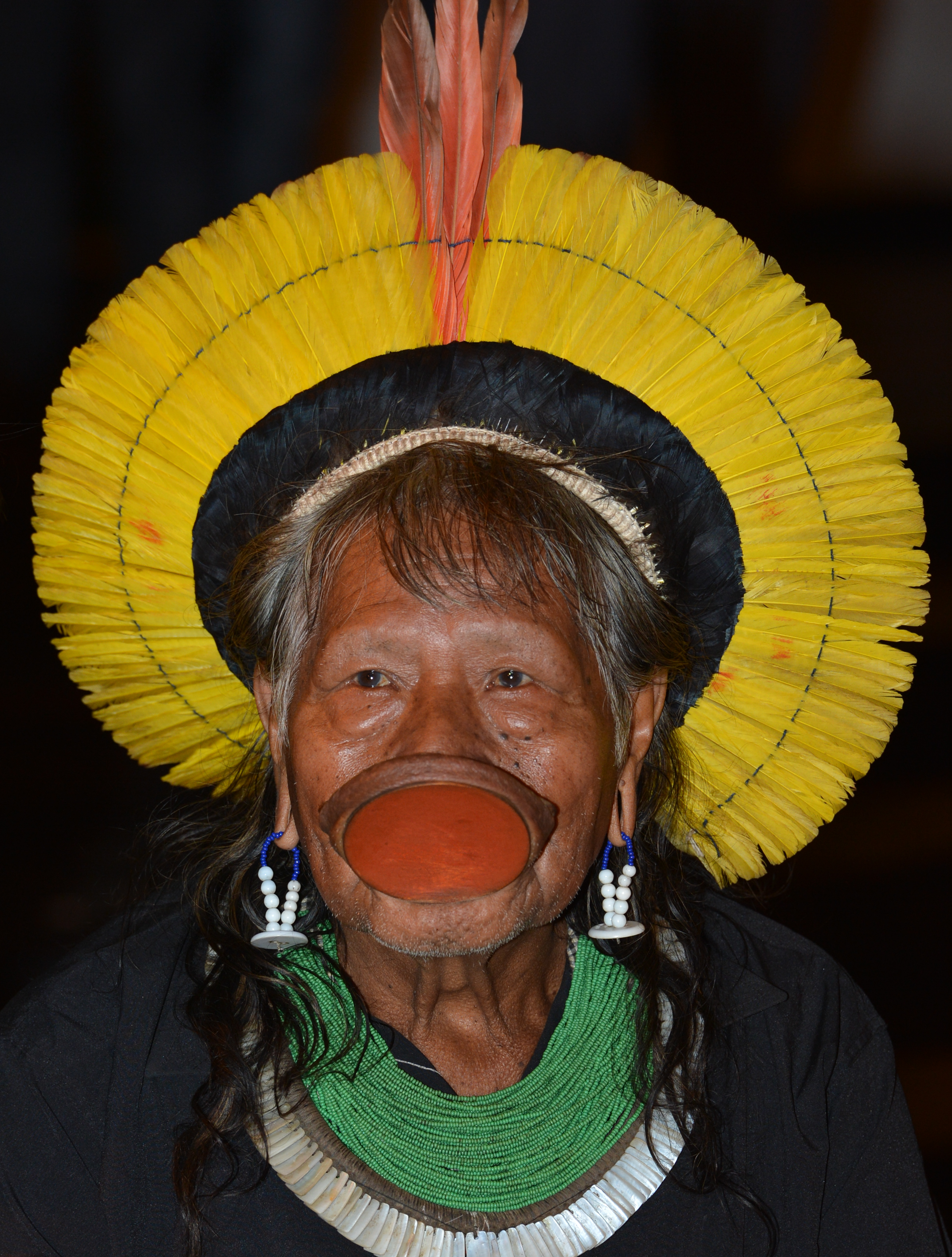 Brasília - O cacique Raoni fala na cerimônia que premia uma série de iniciativas da cultura indígena.